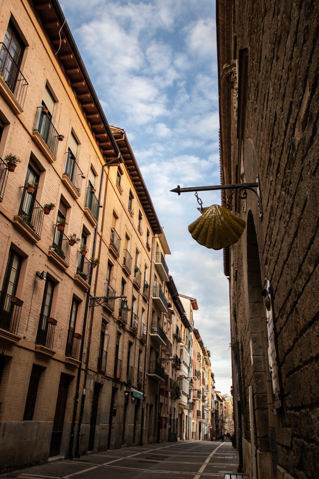 Iruñako errores etxea kokatuta dagoen kaleari ateratako argazkia.